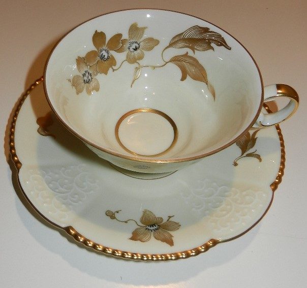 Porzellantasse mit goldener Blume und floraler Prägung